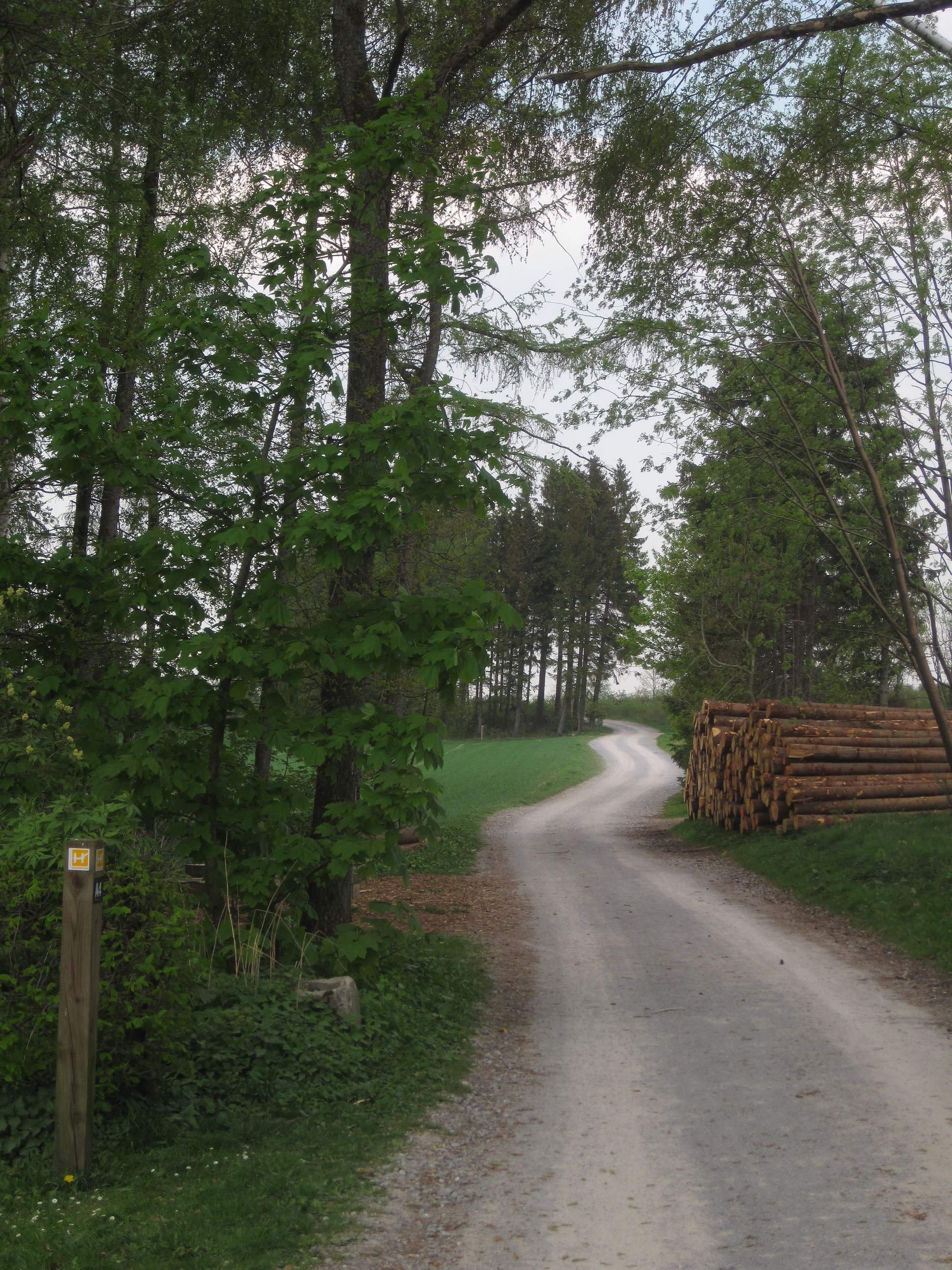 Sauerland-Höhenflug-Wanderweg auf dem Kohlberg in Neuenrade (Wanderrichtung Hemer-Elfenfohren).